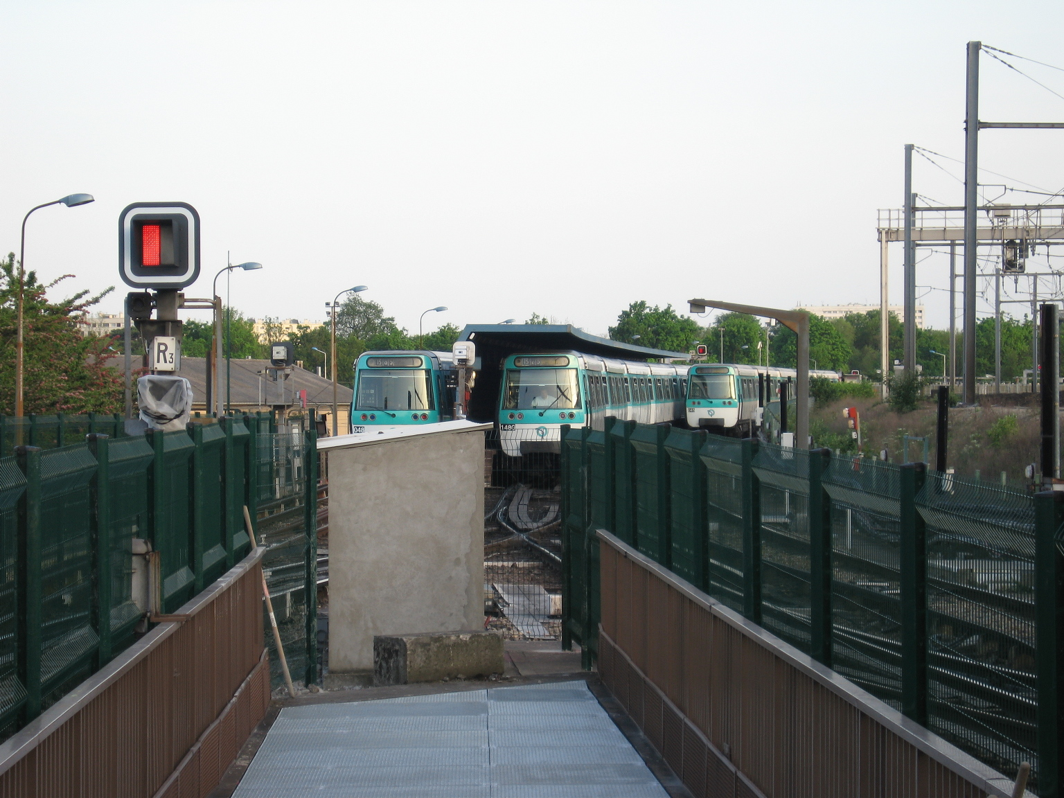 Garages à Châtillon-Montrouge, ligne 13 du métro de Paris.